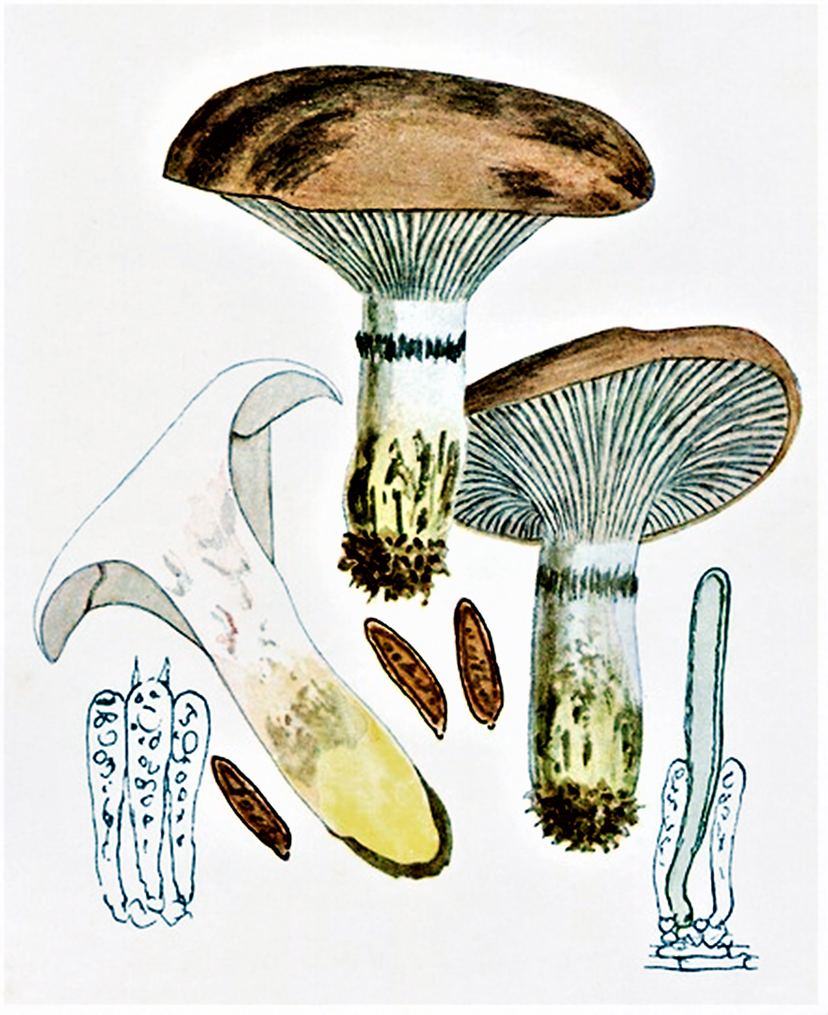 Giacomo Bresadola: Gomphidius glutinosus (1930)